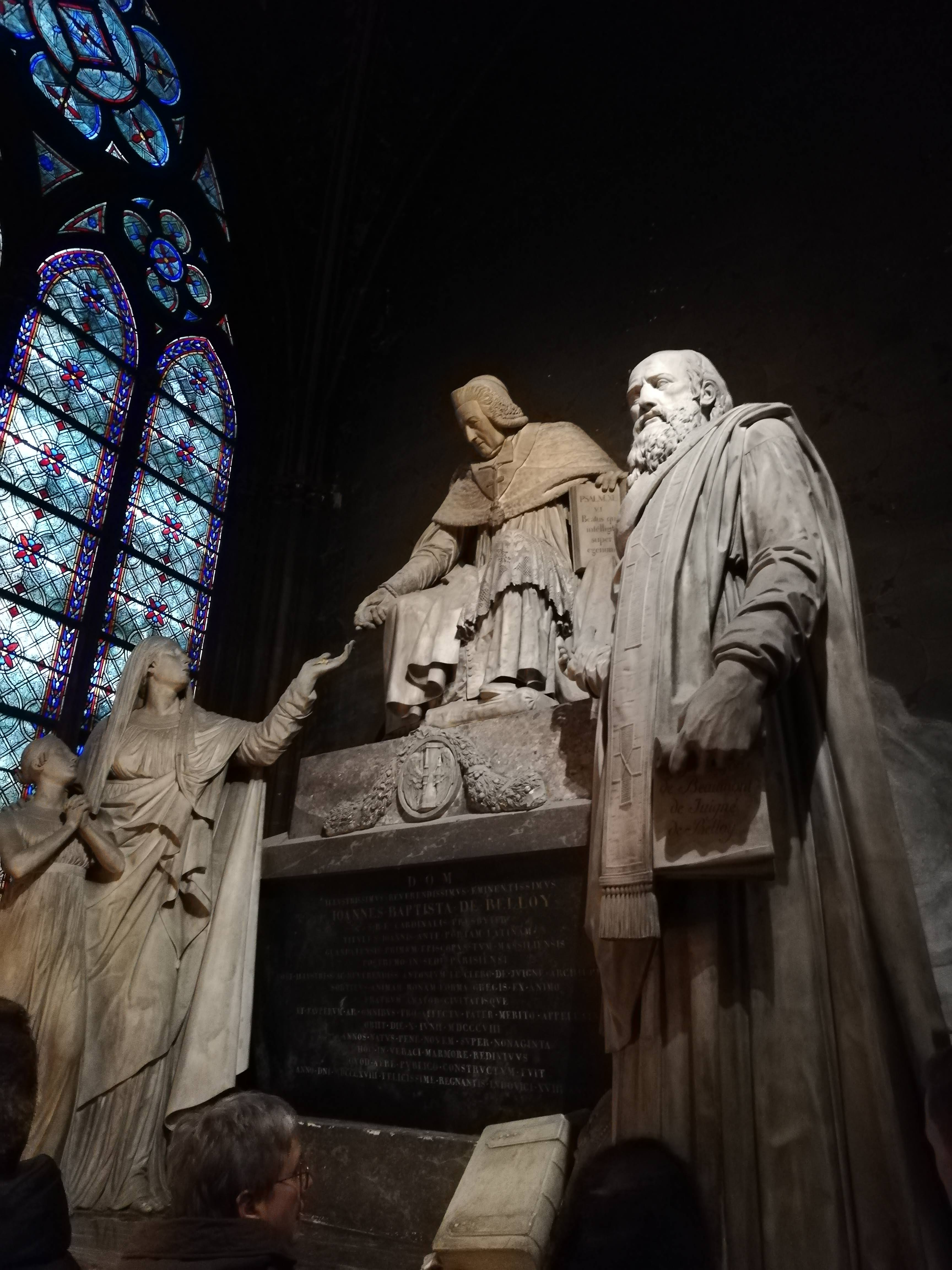 Noel 2018 à Notre Dame chapelle sculpture